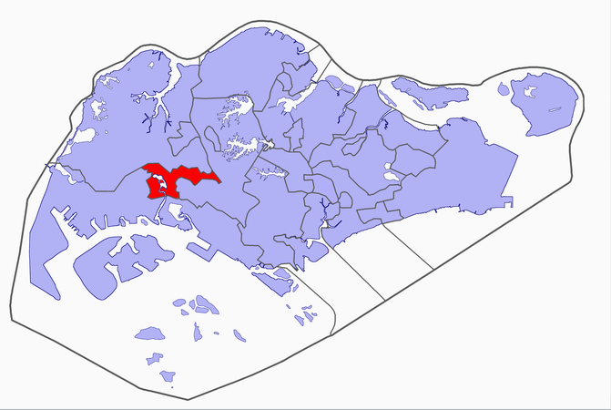 Singapore electoral map, 2006